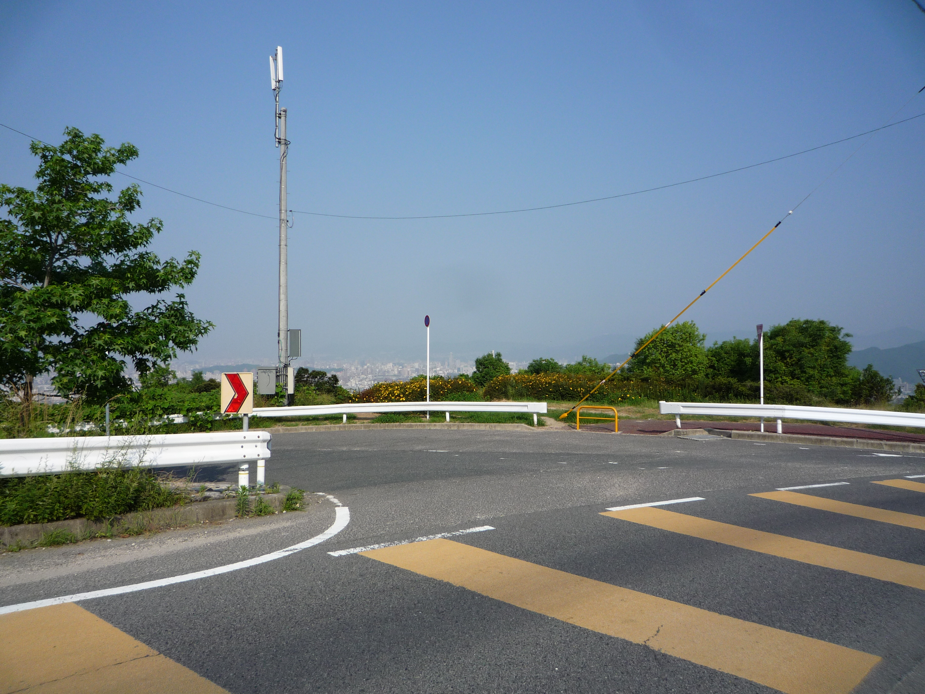 マツダ本社工場無差別殺傷事件 容疑者逮捕場所